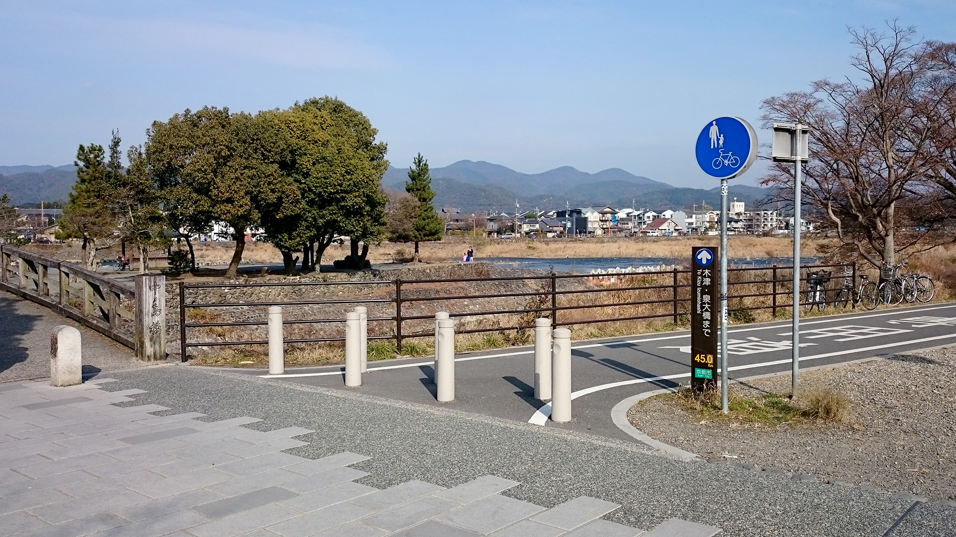 自転車道 嵐山側起点です。 以前の起点は東へ150mほどテニスコート付近にありました。